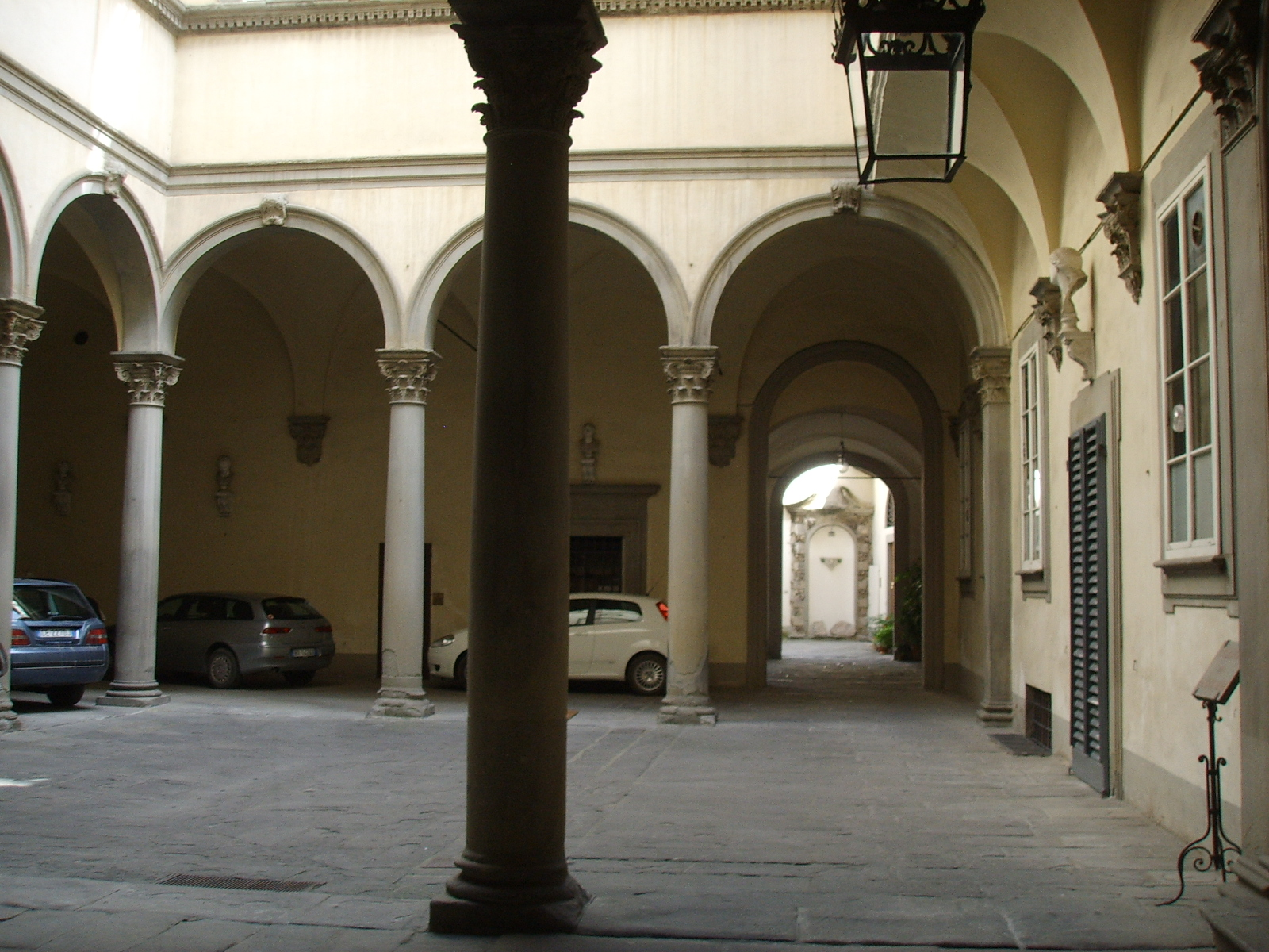 Palazzo ricasoli firidolfi, cortile